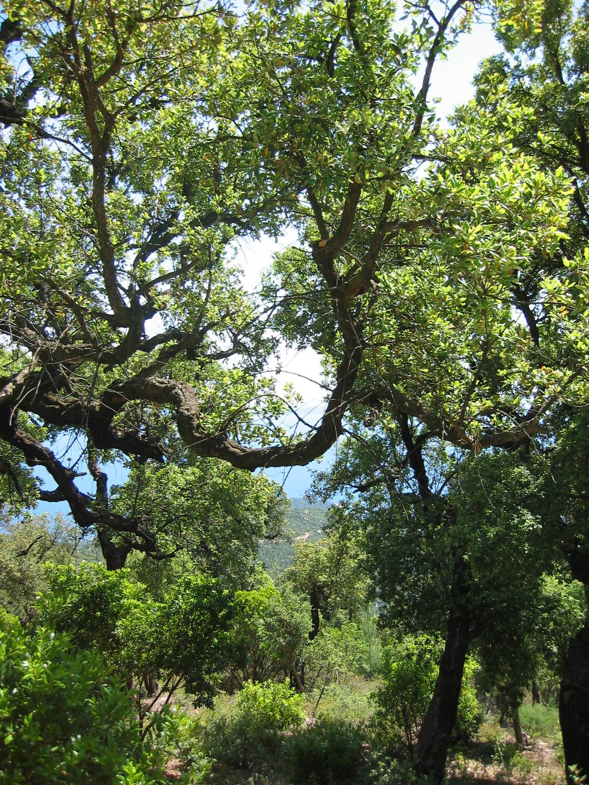 Massif des Maures, Var, France Le Chêne Liège Photo prise le 16 juin 2002 Aut : civodule